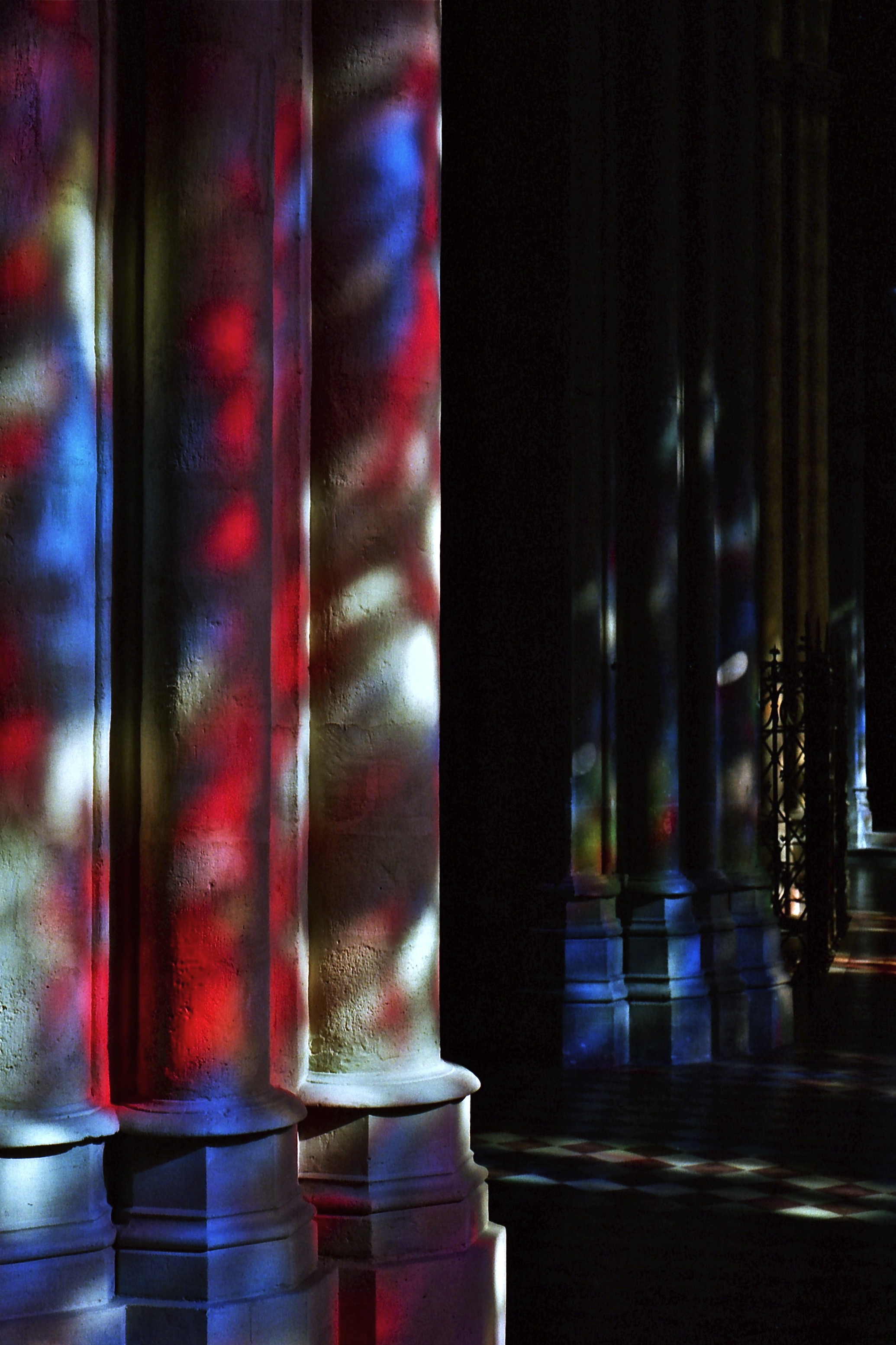 Spiel von Licht und Farben in der Basilika Saint-Michel in Bordeaux